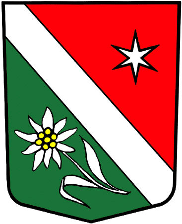 Wappen von Randa Kanton Wallis Schweiz